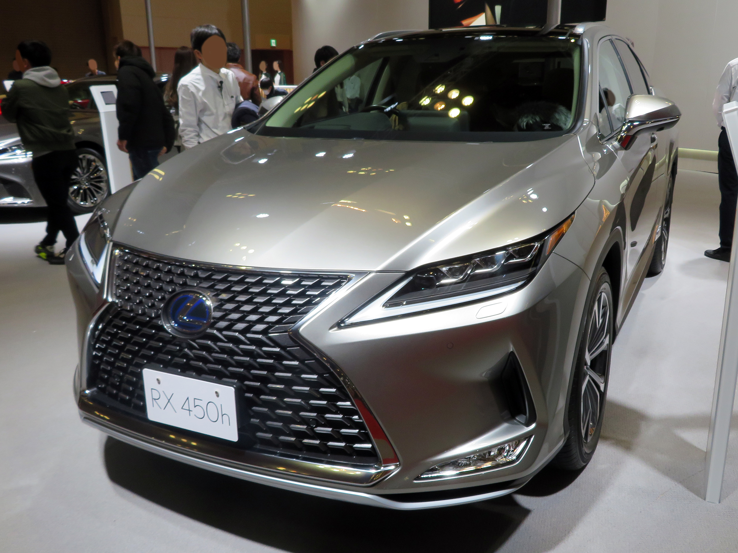 大阪モーターショー2019に於いてDAA-GYL20W-AWXGB(L)型レクサス・RX450h"version L"を撮影。